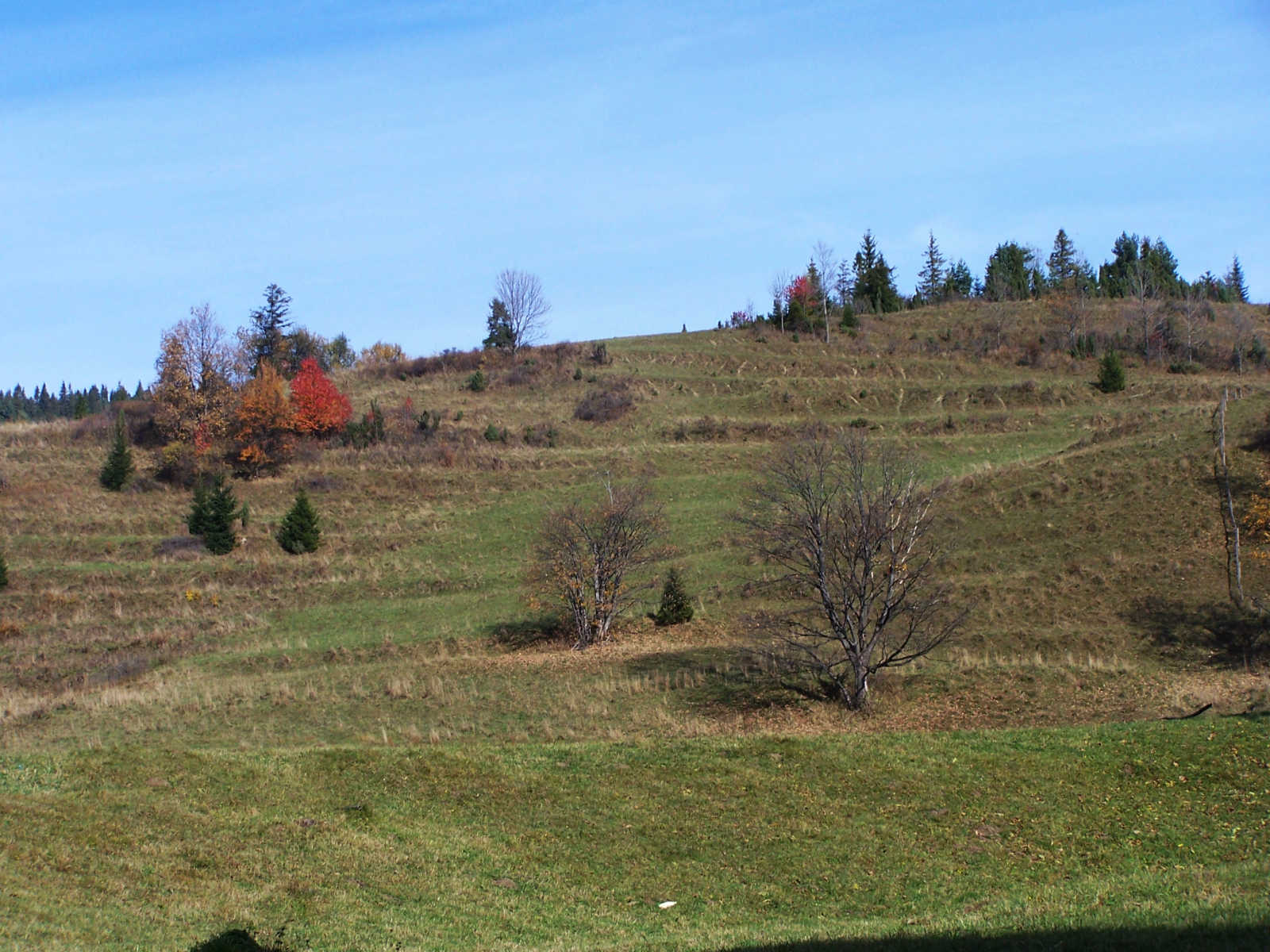 Biała Woda (Pieniny)